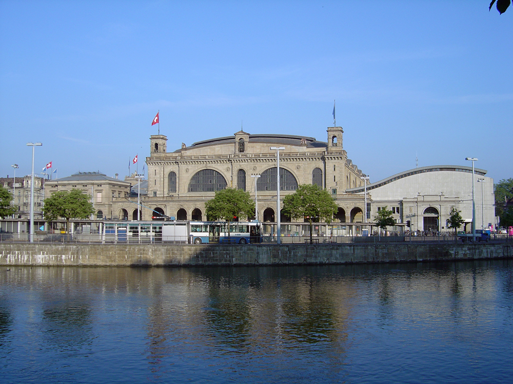 Hauptbahnhof von Zürich, vom Neumühle-Quai gesehen